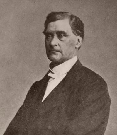 DR. CHARLES VOLNEY DYER